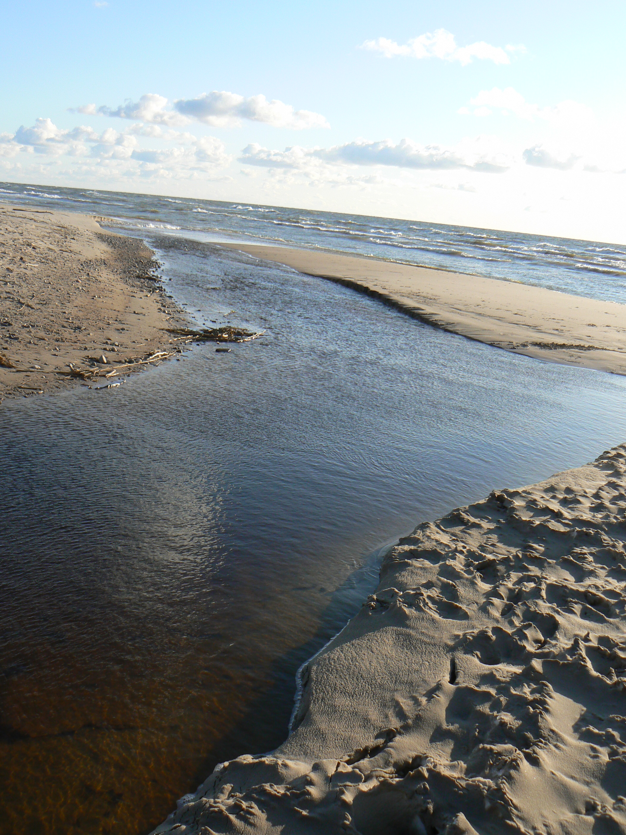 Potok Ošupis se vlévá do Baltského moře. Pohled k západuLietuvių: Ošupis įteka į Baltijos jūrą